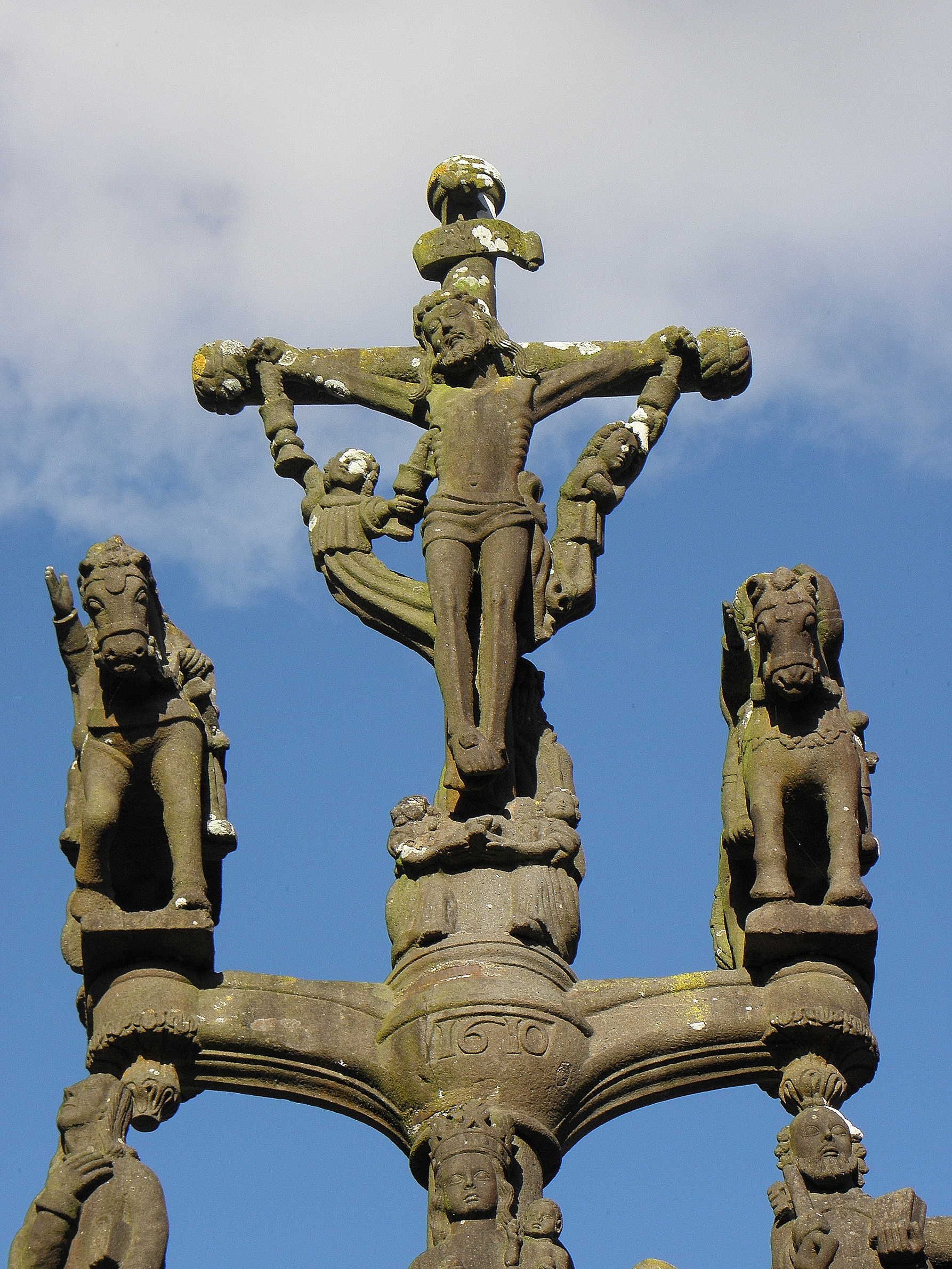 Le Christ en Croix entre deux cavaliers. Croisillon supérieur, face ouest, du calvaire de Saint-Thégonnec (29). .